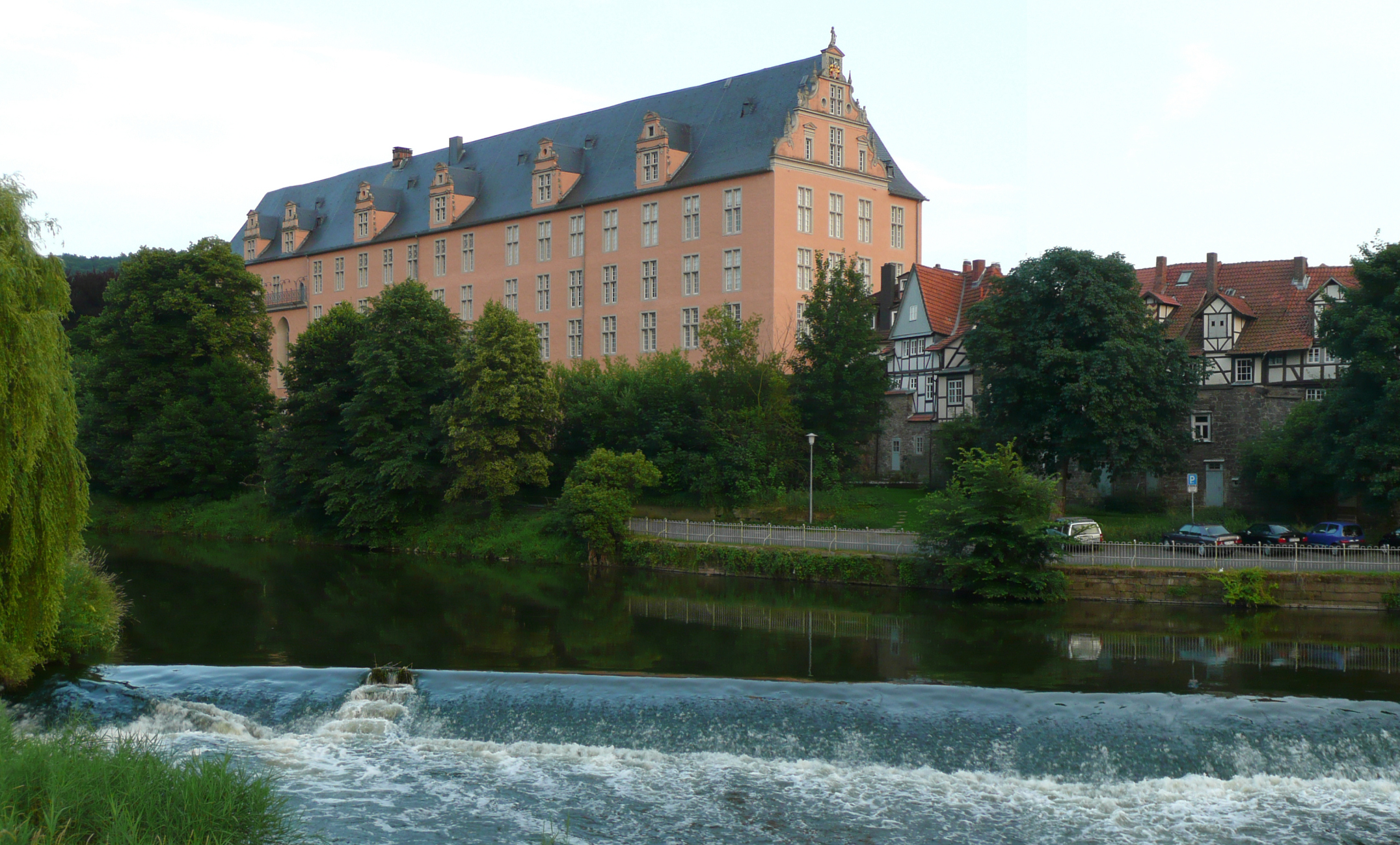 Welfenschloss (Hann. Münden)